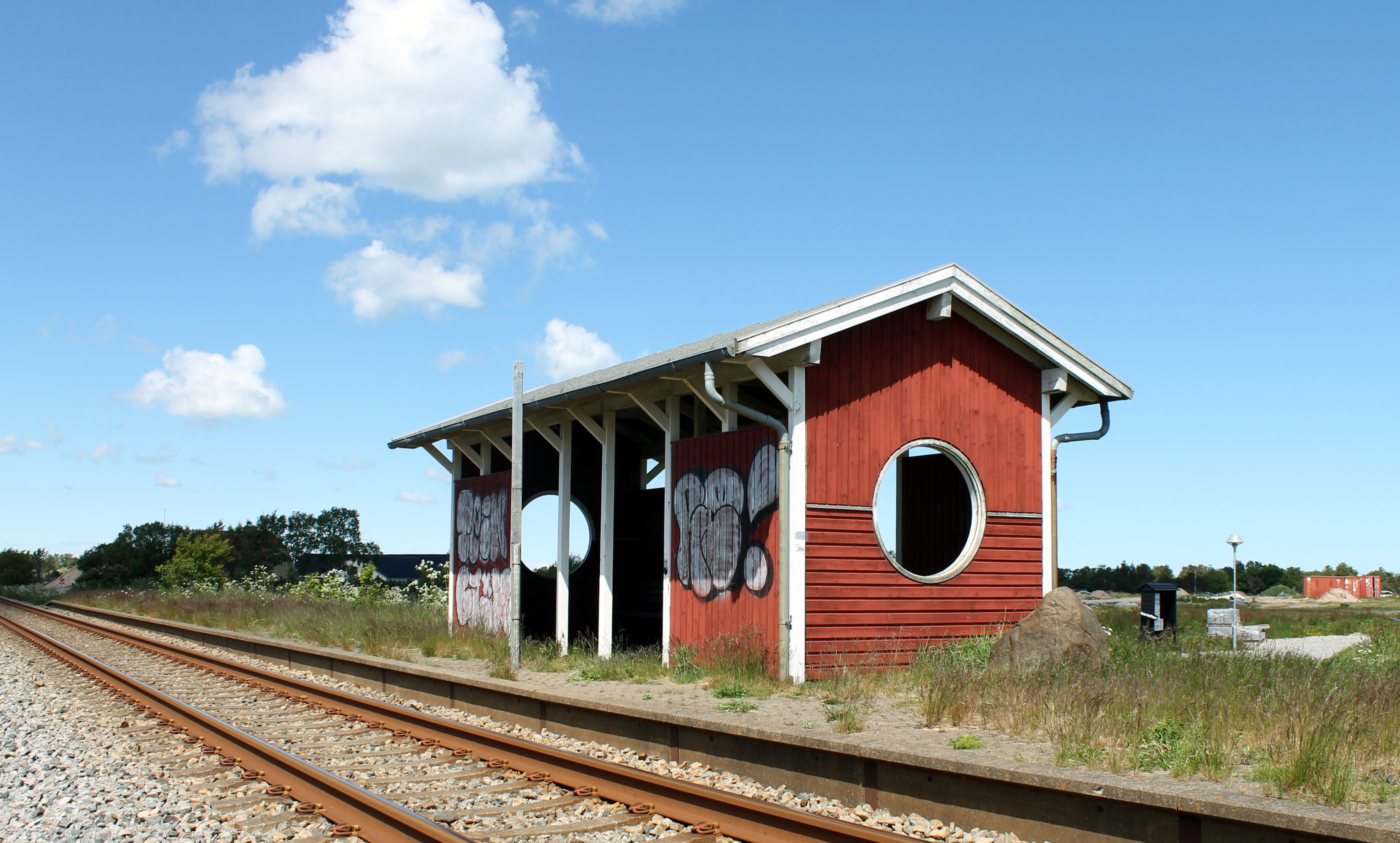 Skagensbanen - Apholmen Trinbræt (nedlagt)